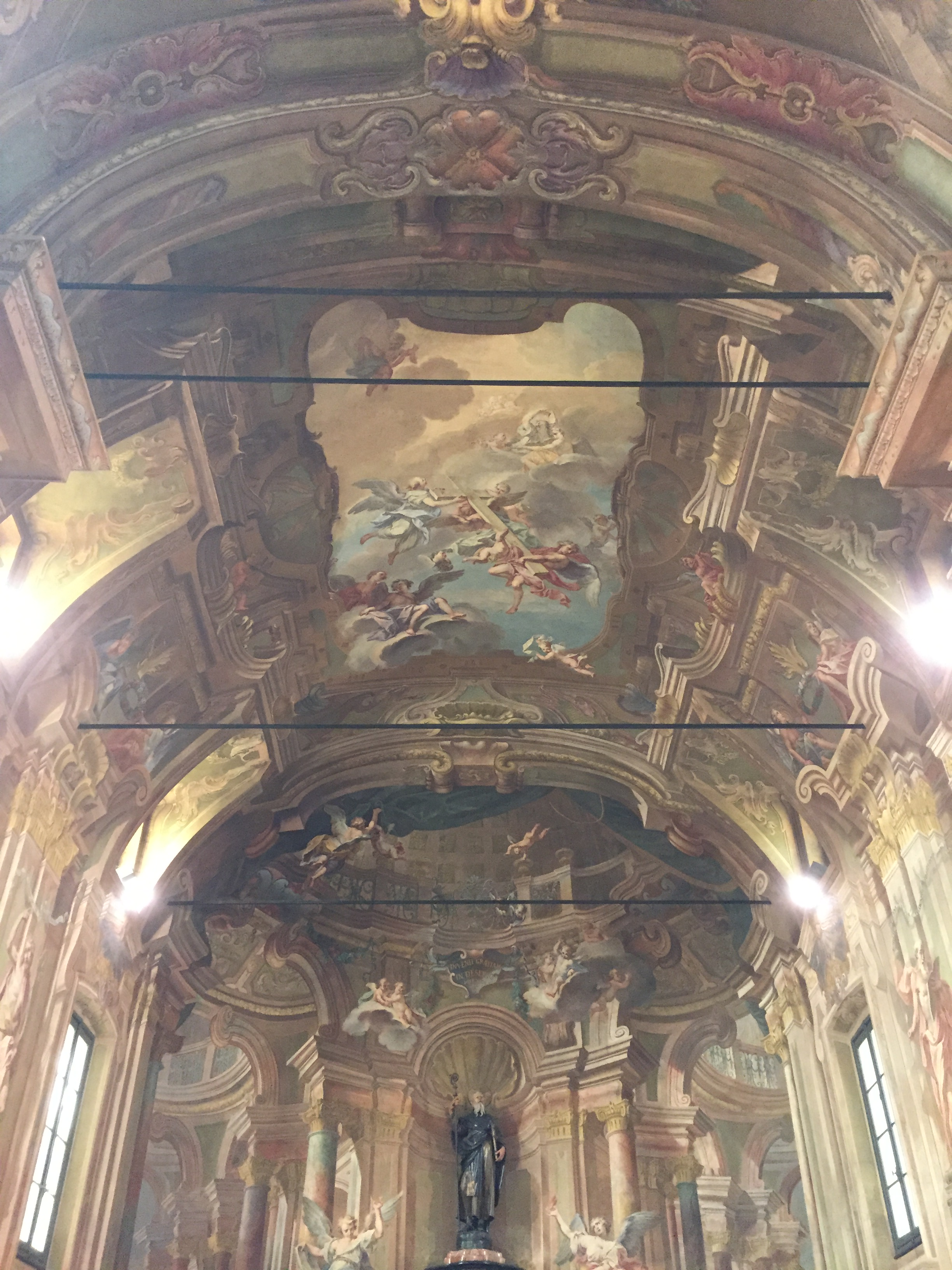 Interno chiesa di S. Antonio alla Motta, Varese, Italia